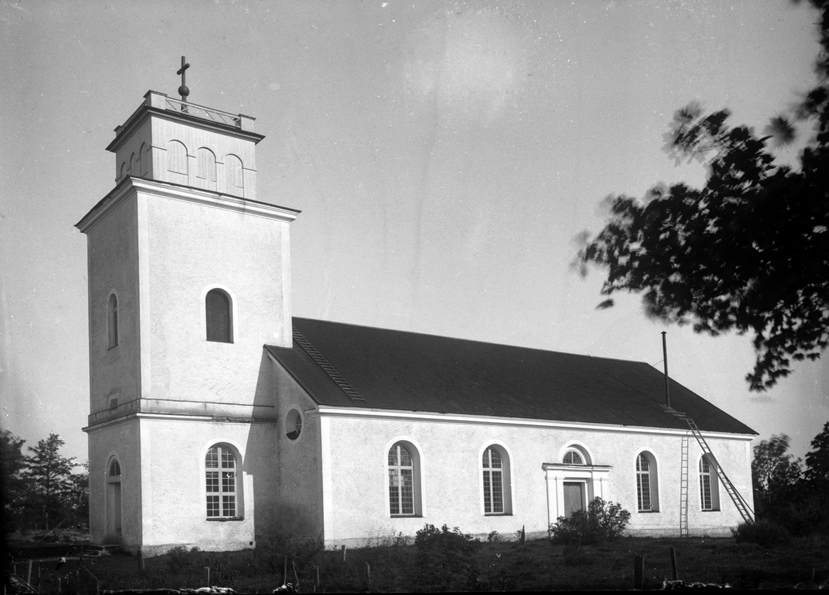 Edshults kyrka